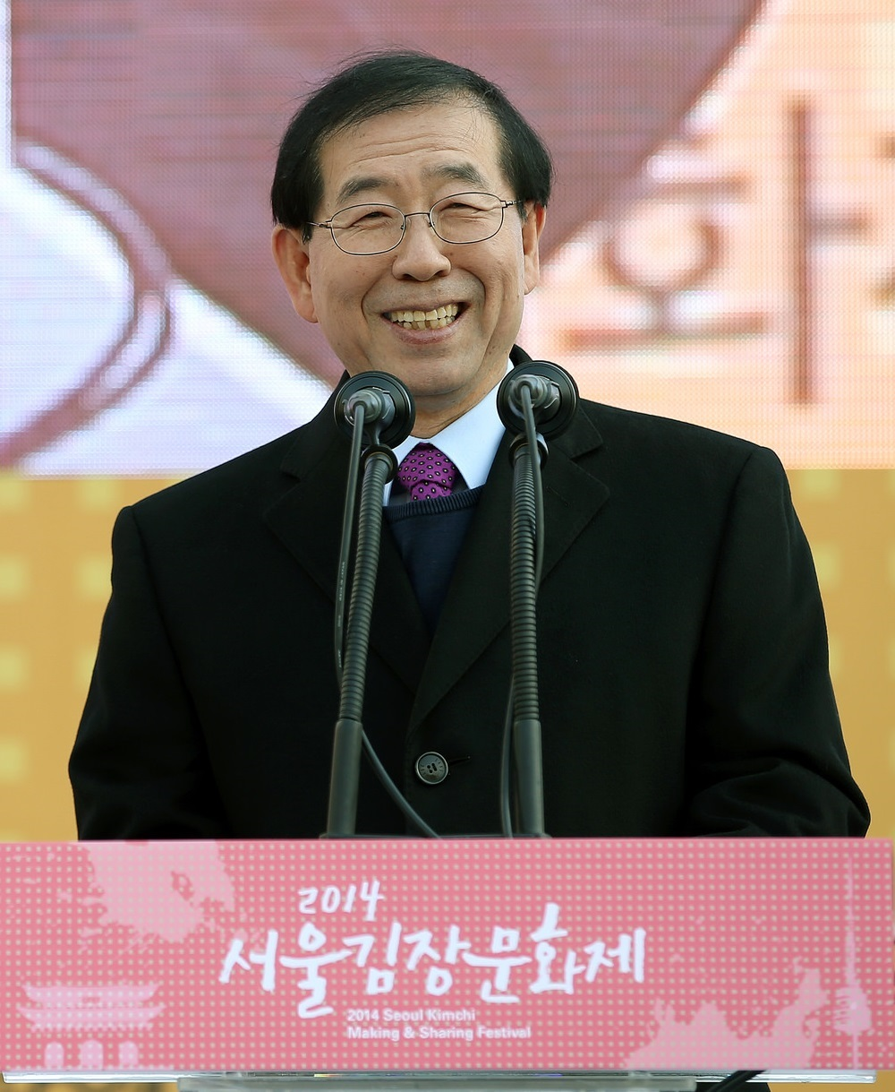 2014 서울김장문화제 2014-11-14 서울광장